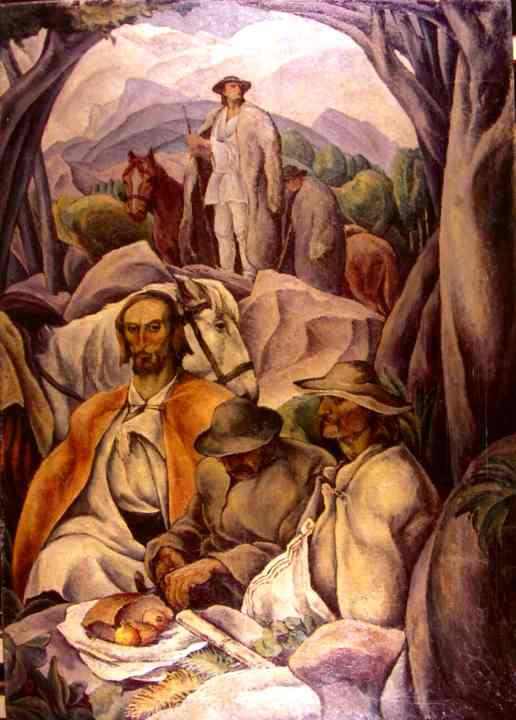 Ion Theodorescu-Sion - Străjerii, ulei pe pânză, 151,5x106 cm, 1925, deţinător: Muzeul Naţional de Artă al României din Bucureşti.